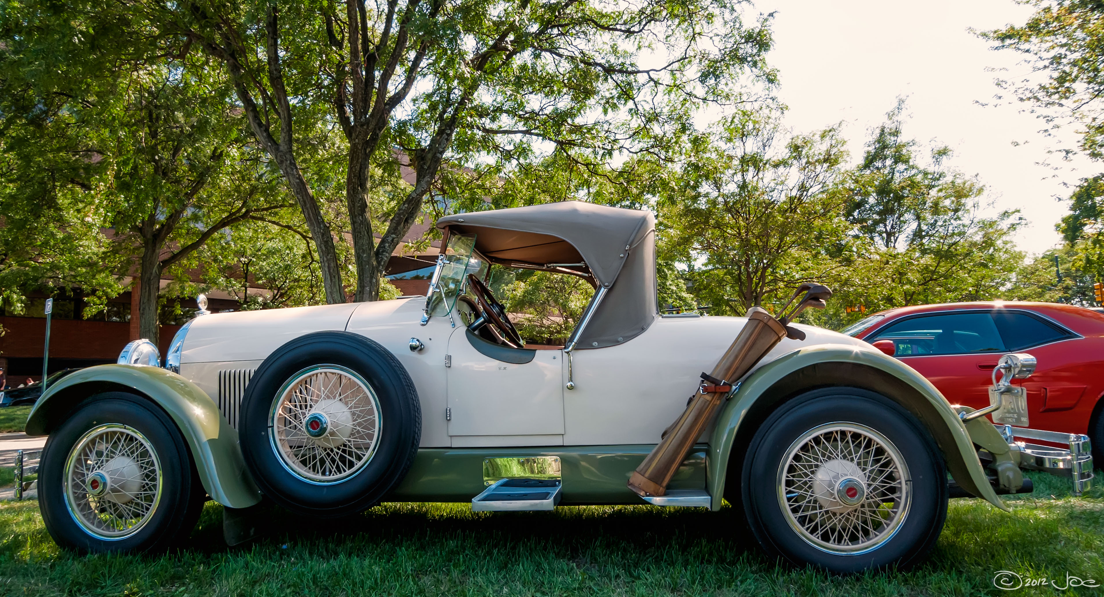 1927 Kissel 8-75